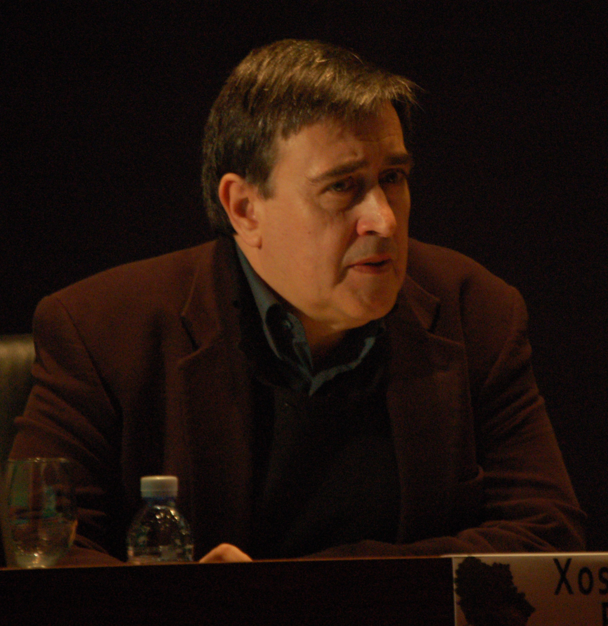 Xosé Manuel Pereiro no I Simposio Ecolingua